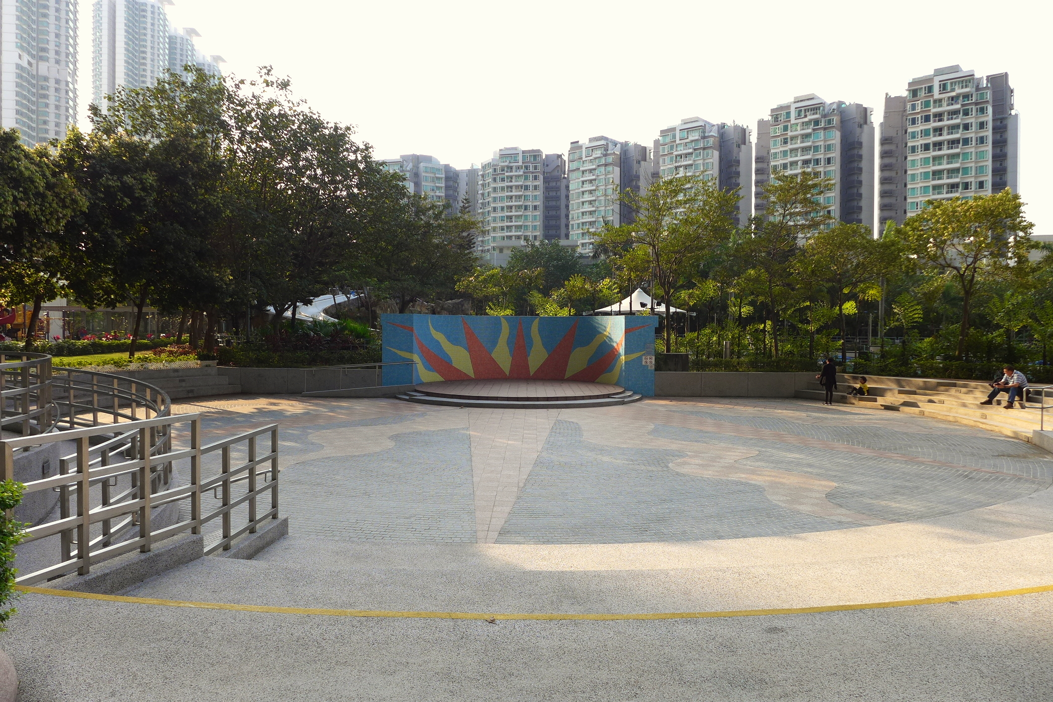 Coastal Skyline Sun Studio